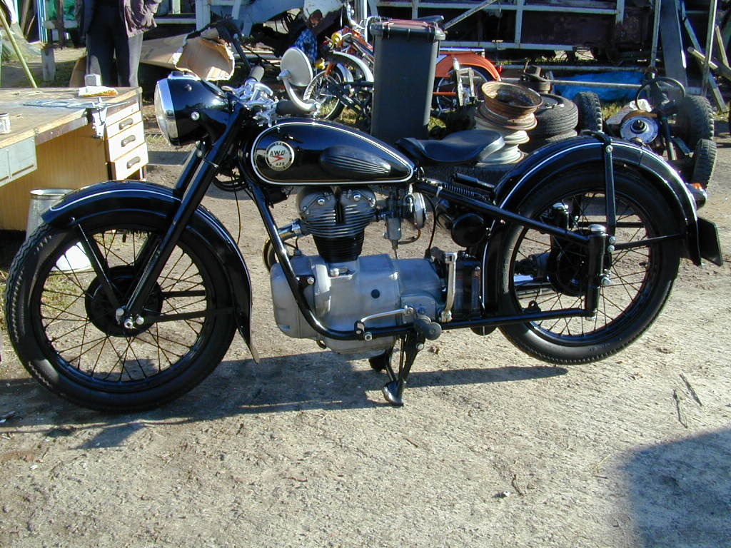 Touren-AWO